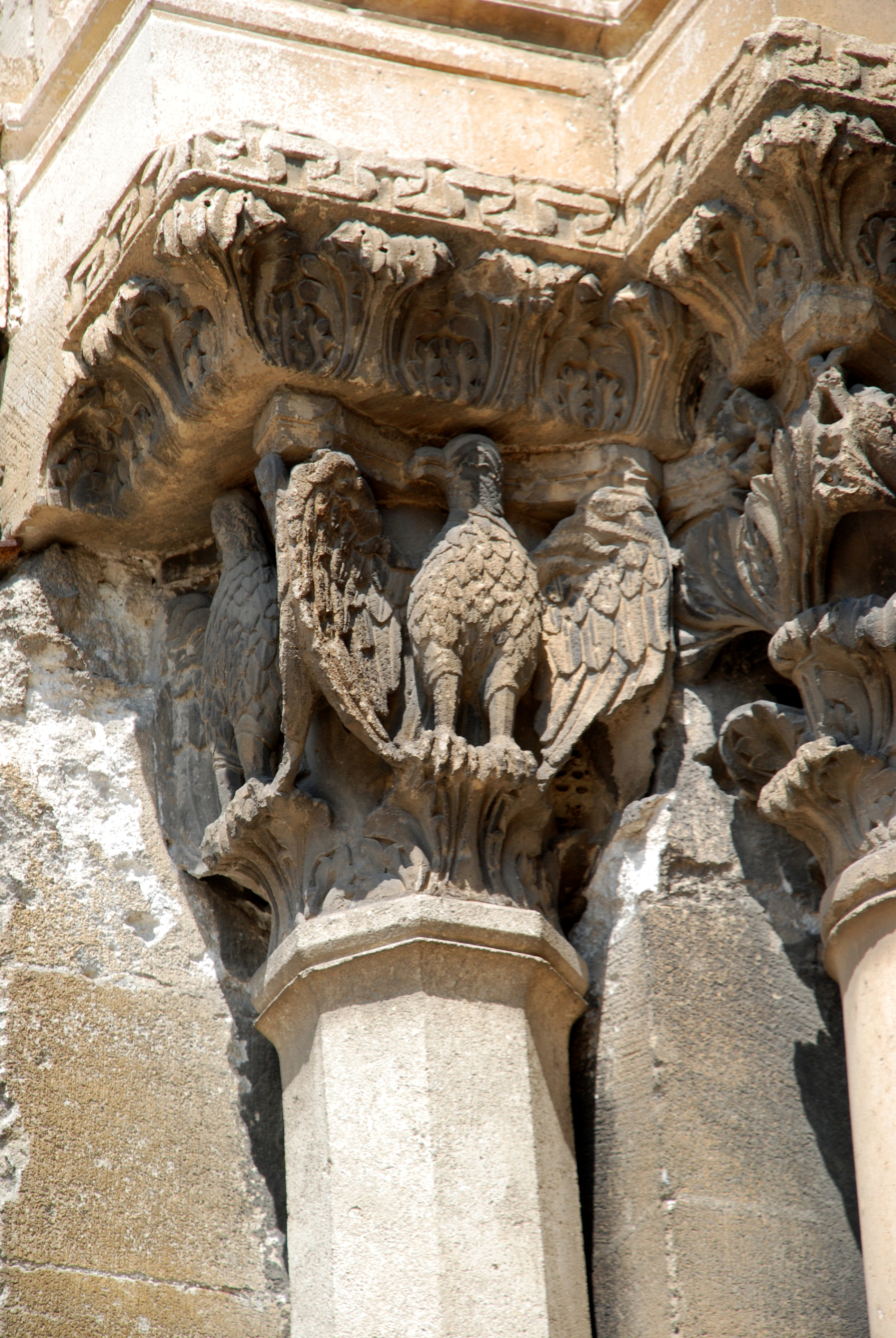 France - Provence - Tarascon - Église Sainte-Marthe de Tarascon